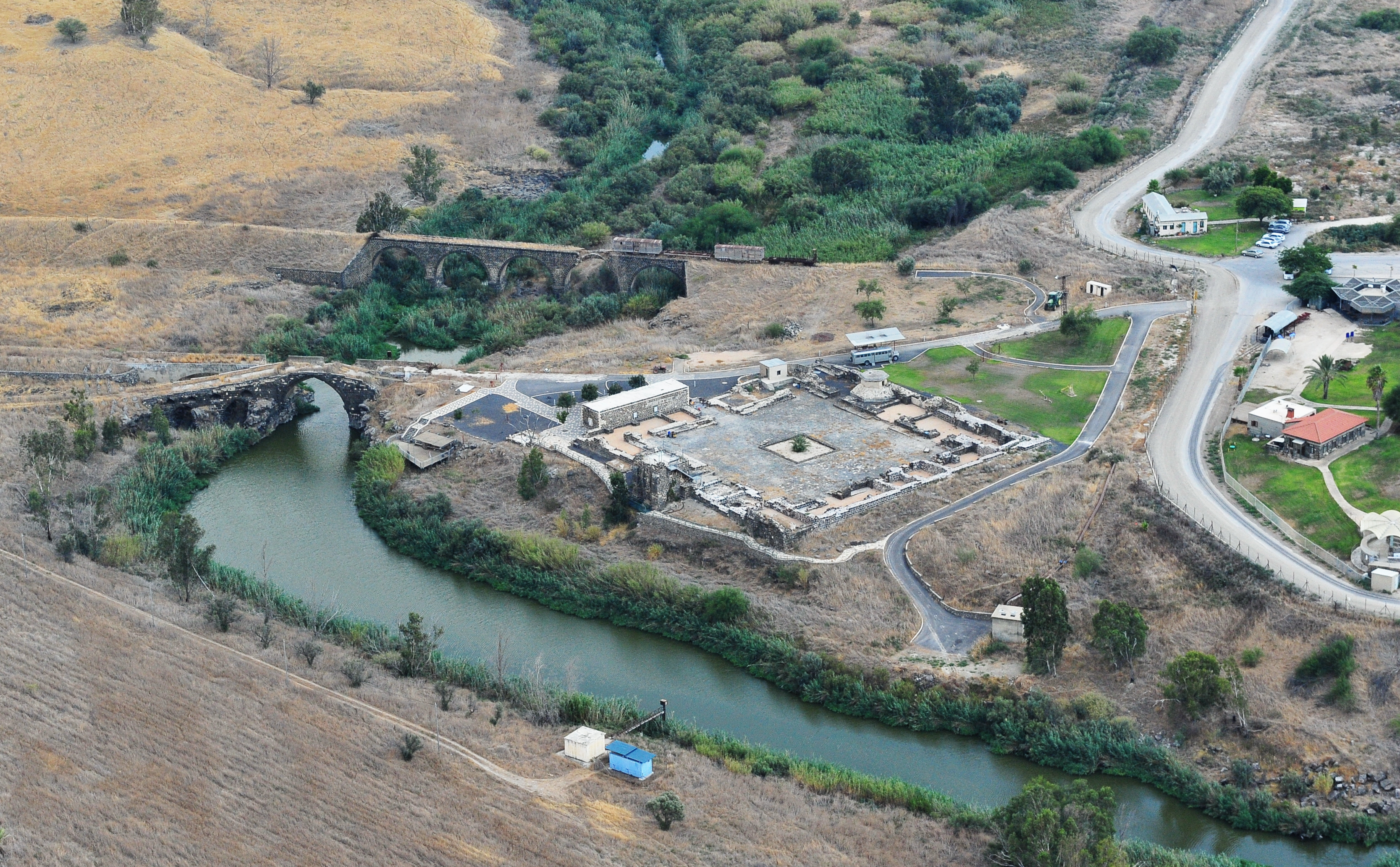 גשר הישנה ונהריים